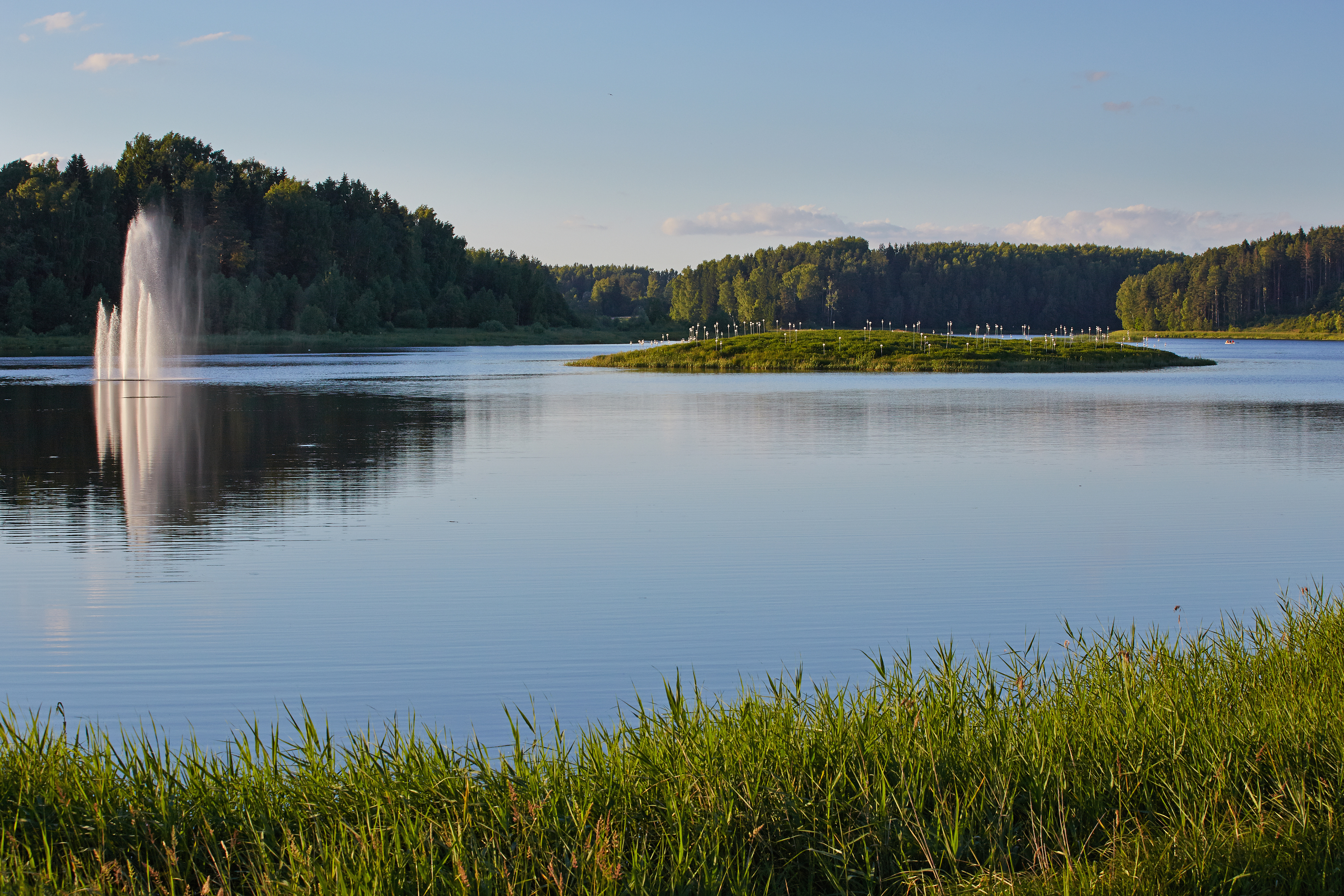 Põlva järv 2013. aasta juunis.